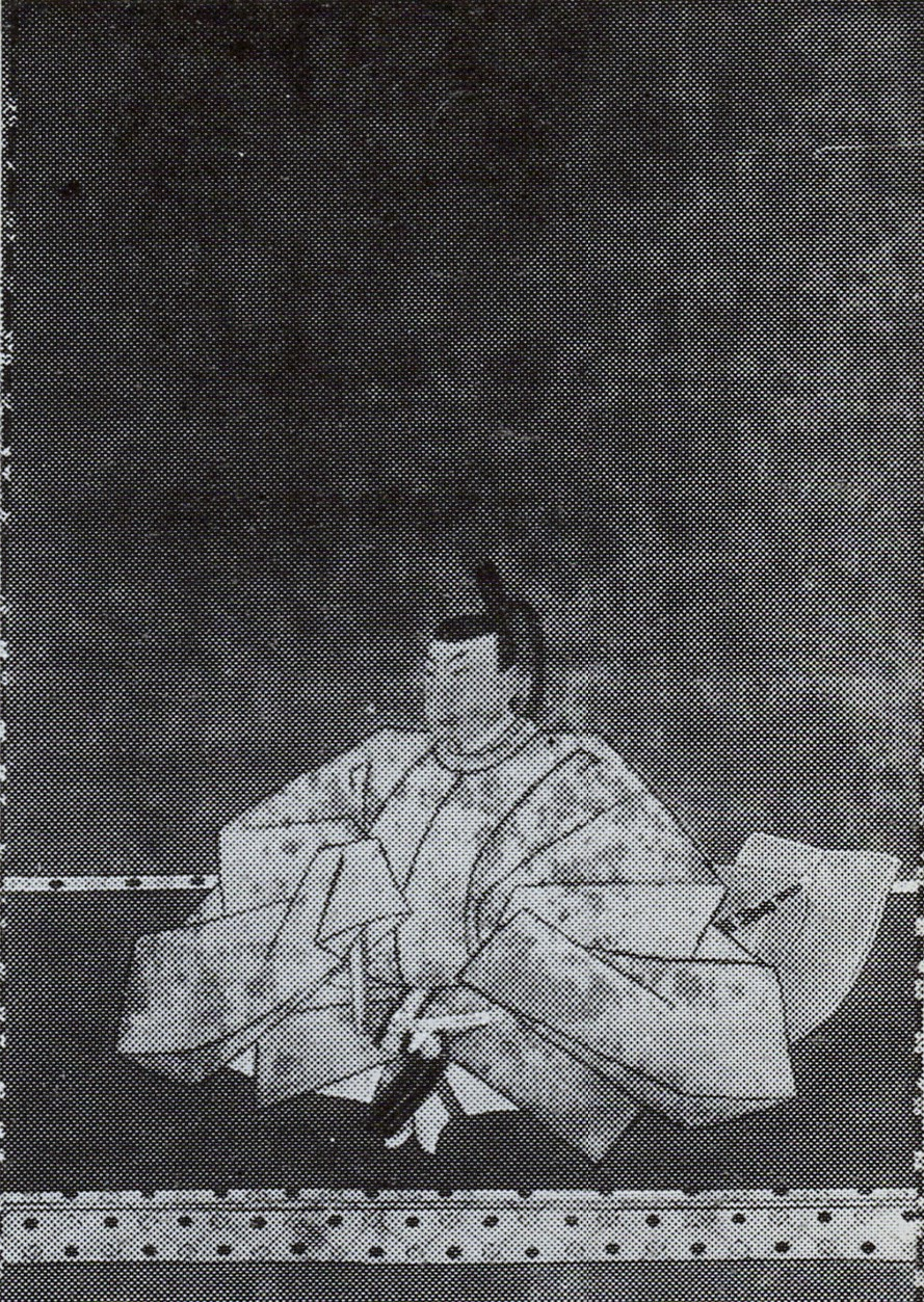 相良頼央の肖像(モノクロ)。